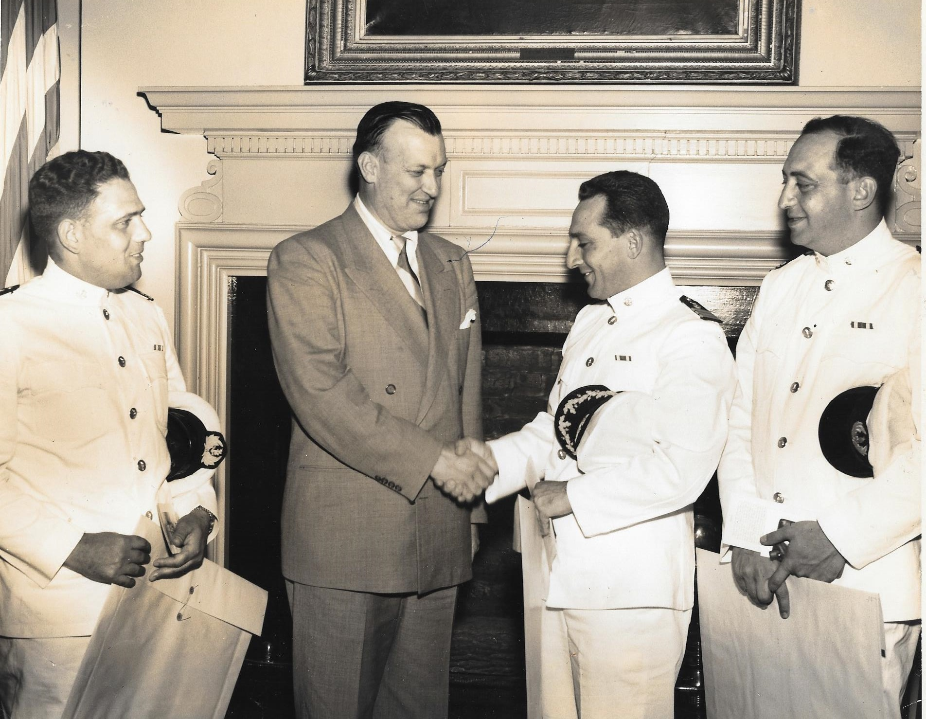 מפקדי משלחת חיל הים נפגשים עם מושל מדינת מרילנד